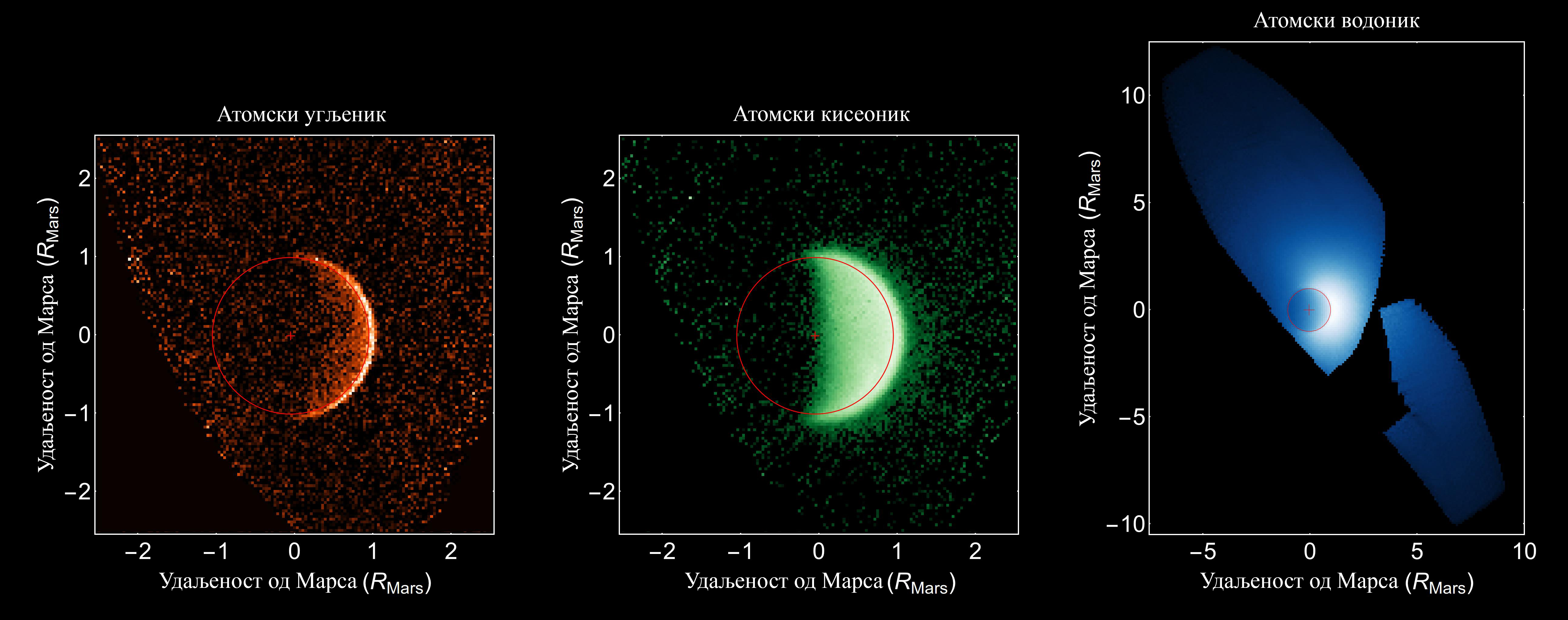 Српски (ћирилица): Нестанак атмосфере на Марсу (угљеник, кисеоник, и водоник), снимљено сондом Мејвен у UV